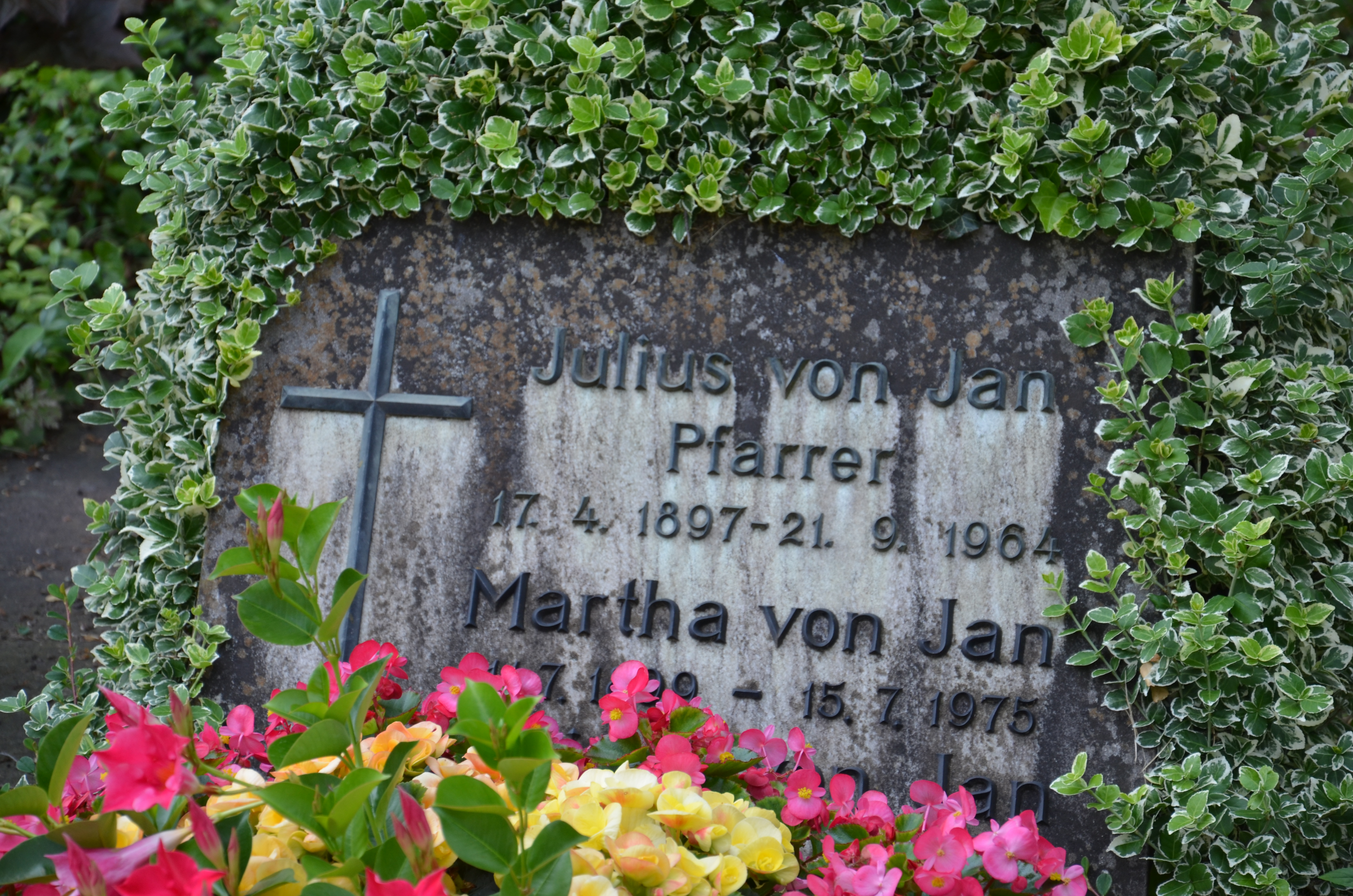 Der Pfarrer Julius von Jan ist in Korntal bestattet.